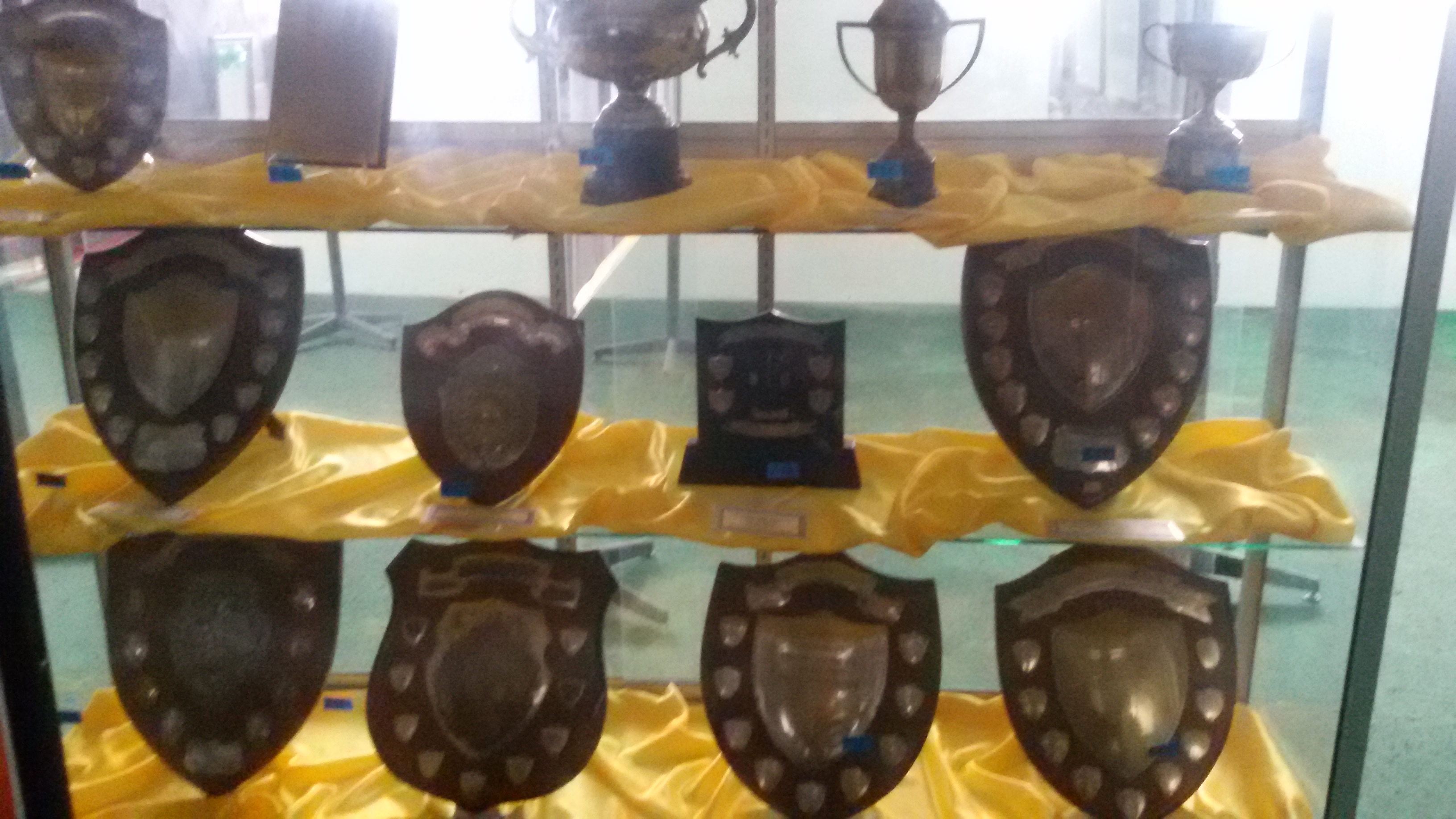 koleksi piala yang terdapat di galeri warisan